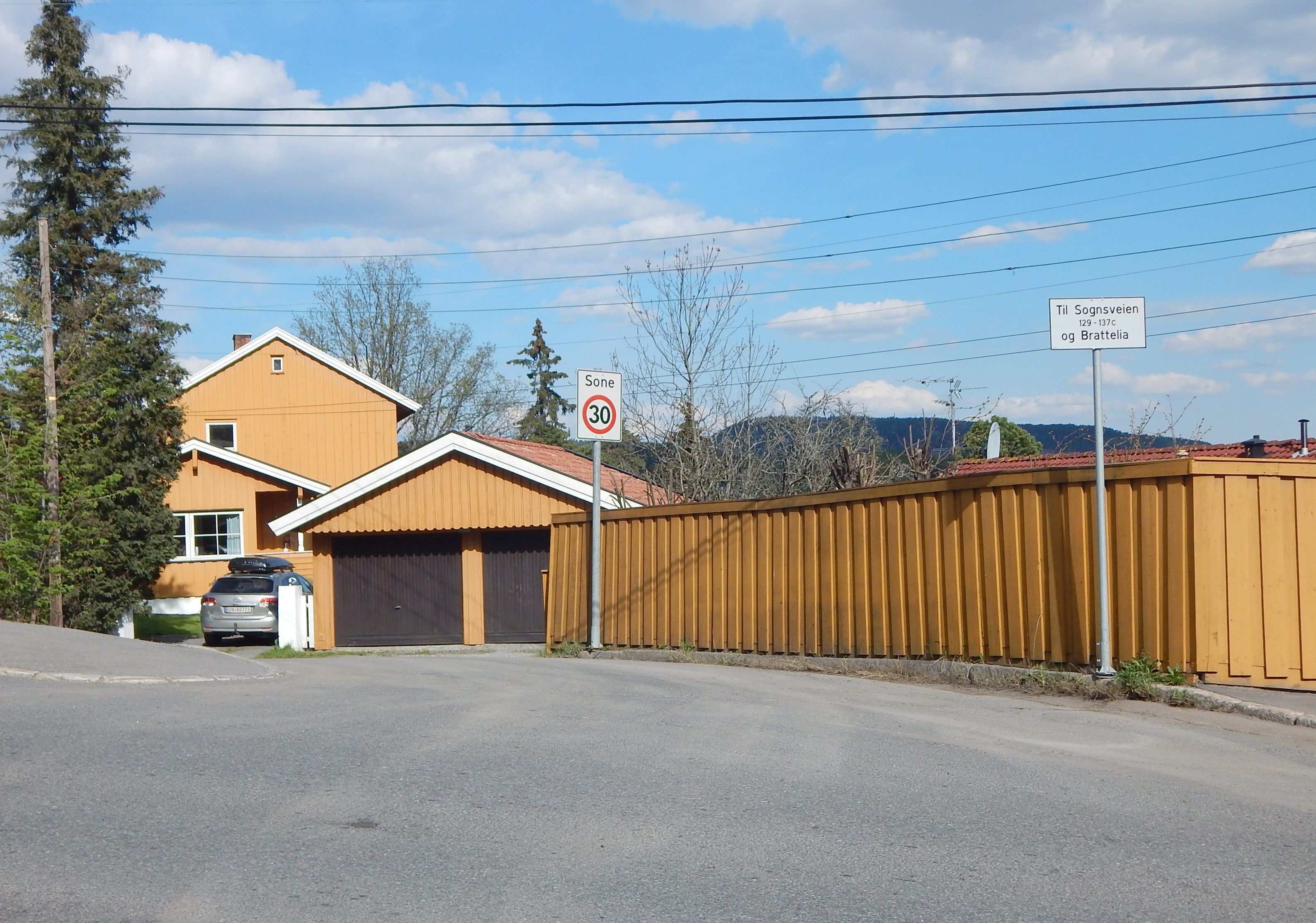 Brattelia sett fra Sognsveien